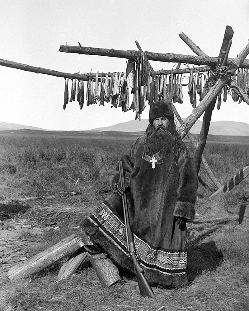 Православный священник из Гижигинска в одежде из Оленьих шкур, 1901 г. Снимок из фондов Джезаповской экспедиции. AMNH. Негатив №22144